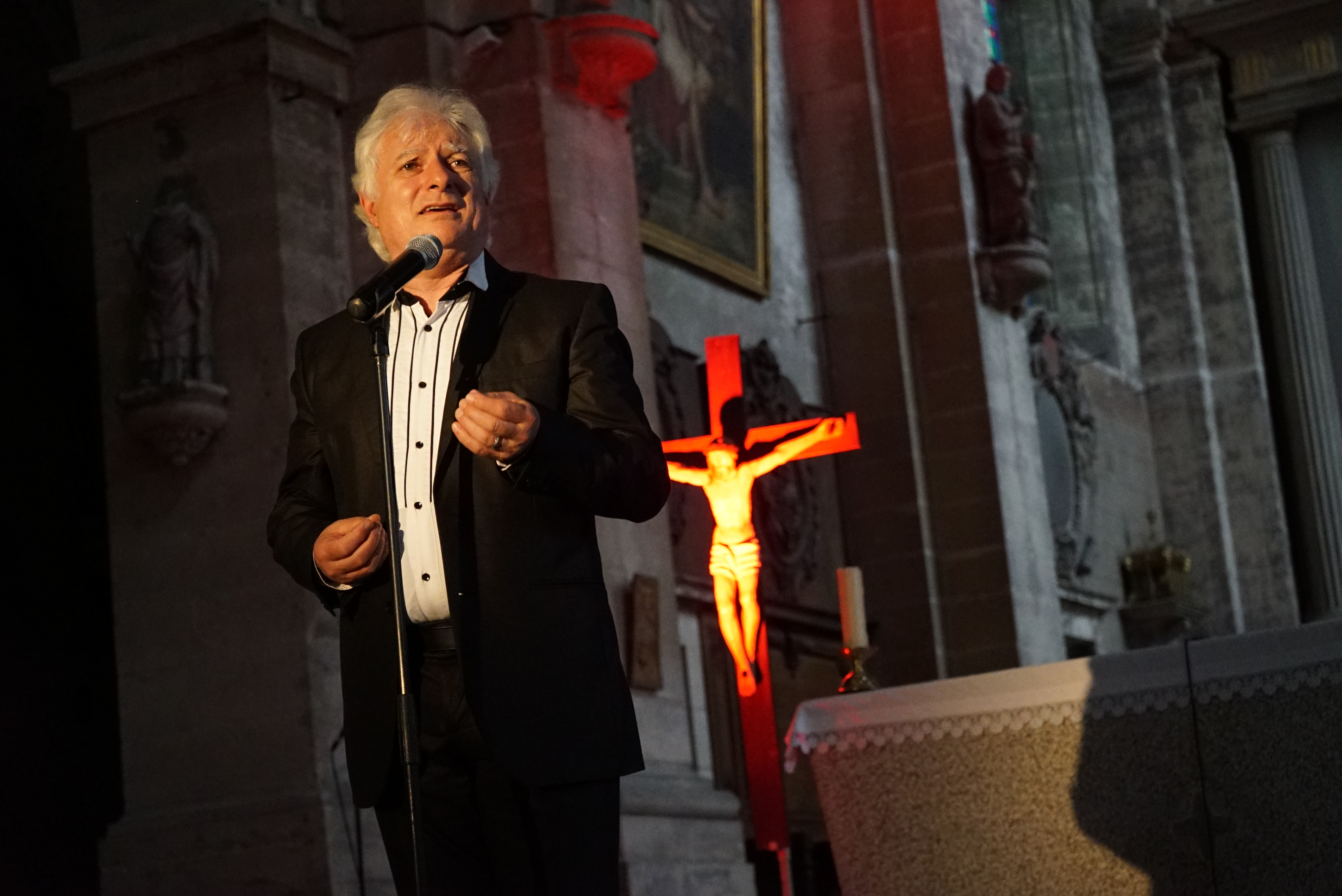 parice martineau, représentation à Reims..